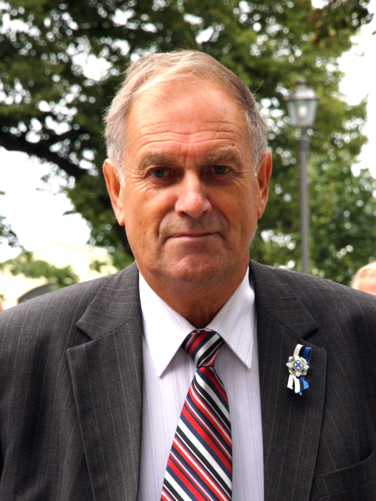 Tiit Made